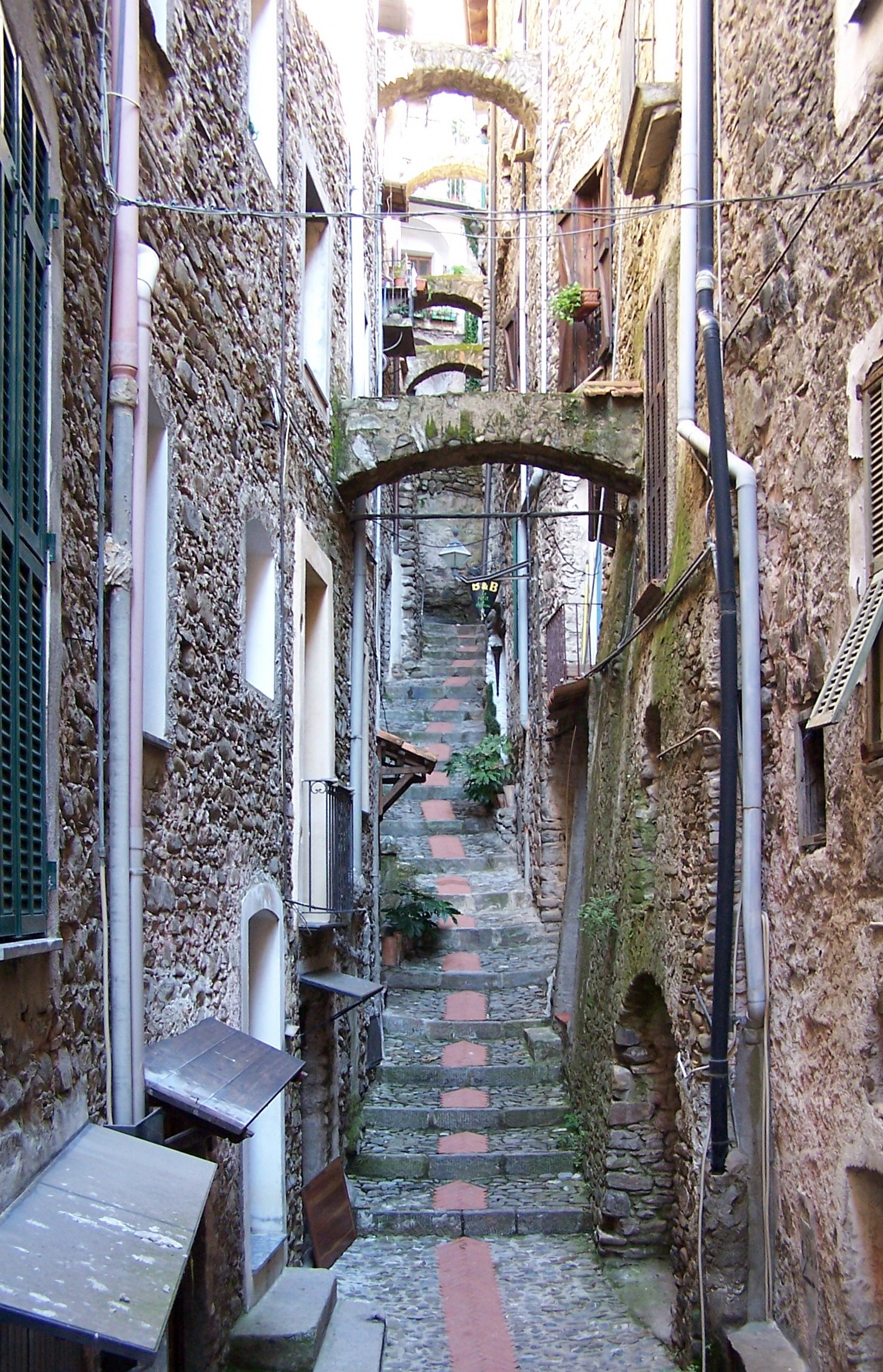 Dolceaqua in Italy